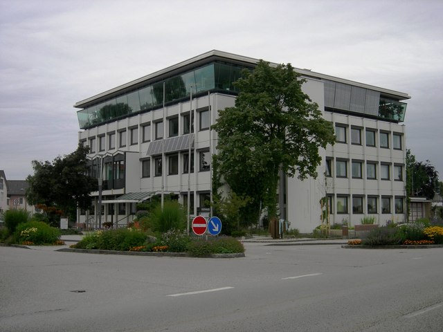 Vaterstetten: Rathaus